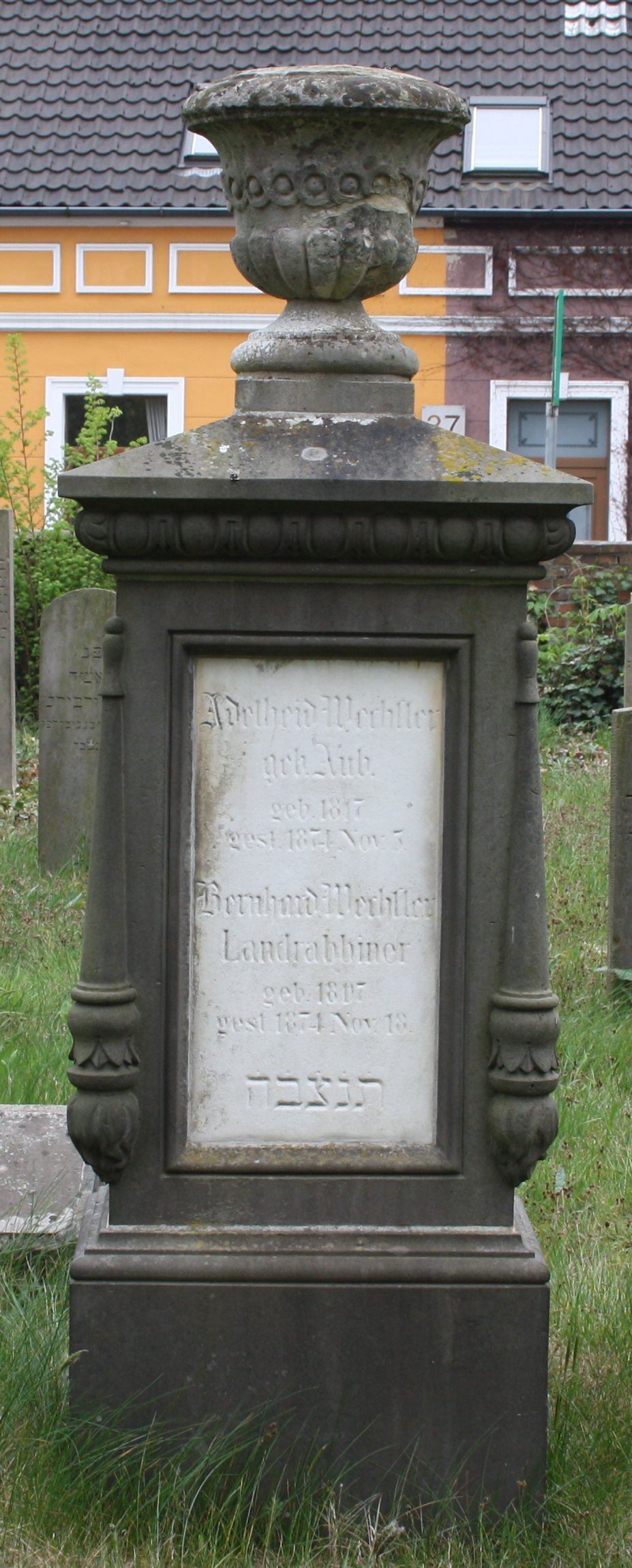 Grabstein des Landrabbiners Berhard Wechsler (1807-1874) und seiner Ehefrau Adelheid Wechsler (geb. Aub; 1817-1874) auf dem jüdischen Friedhof zu Oldenburg